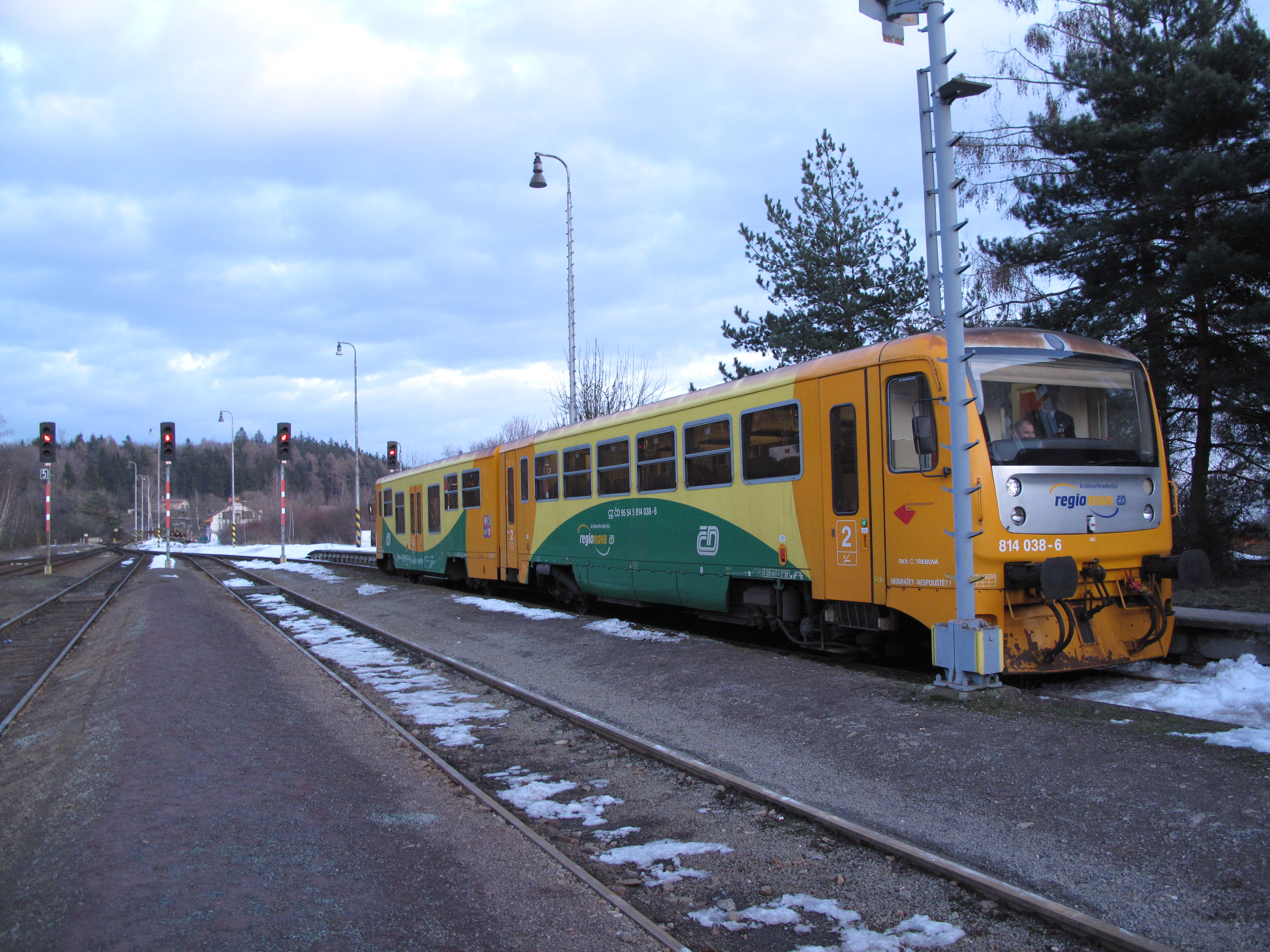 Starkoč, Regionova